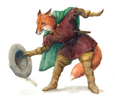 label QS:Lfr,"Renart le renard, illustration de Fedor Flinzer pour une édition du Roman de Renart destinée à la jeunesse, vers 1900." label QS:Lde,"Reineke fox"